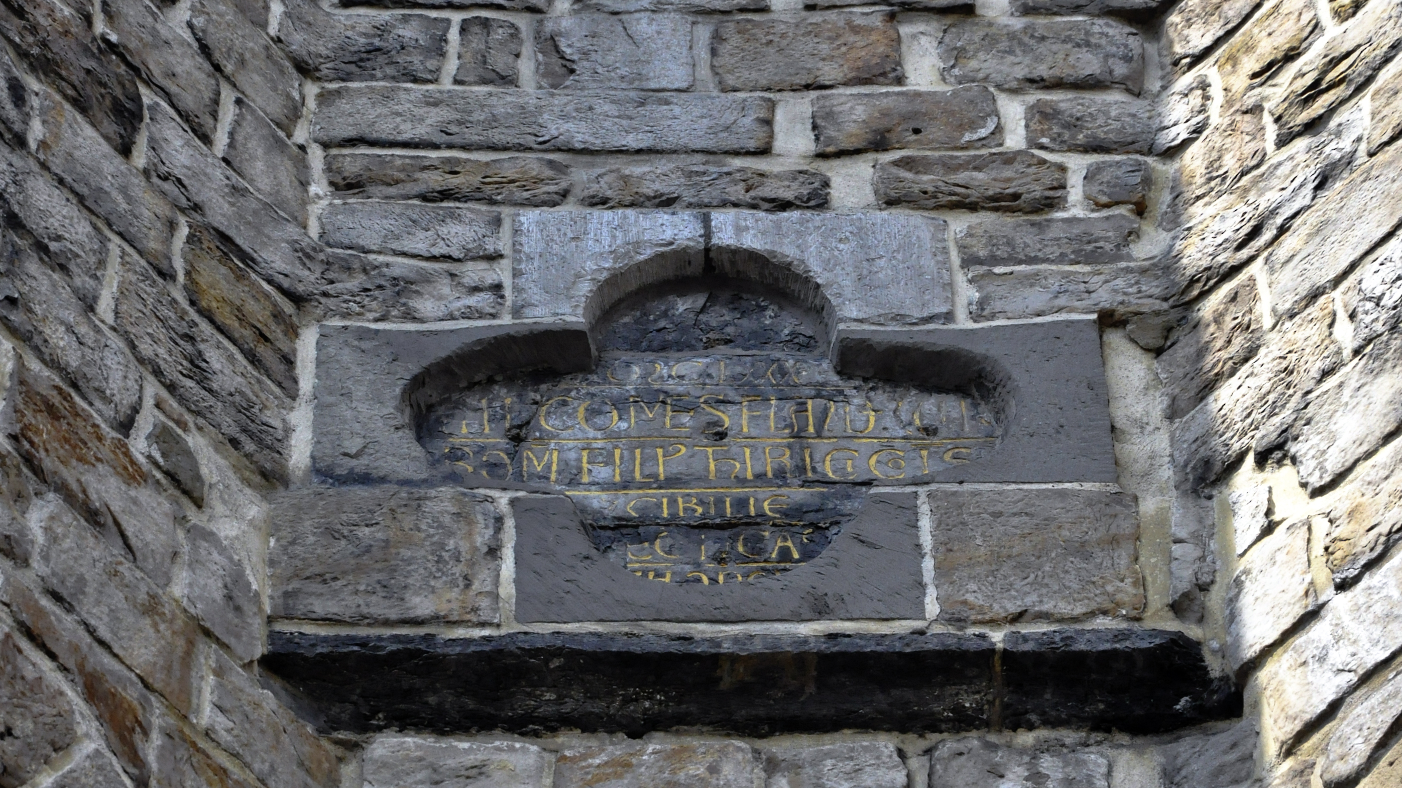 Gravensteen te Gent, België met een opschrift in Latijn boven de toegangspoort: "Anno incarnationis MCLXXX Philippus Comes Flandrie et Viromandie filius Thirici comitis et Cibilie fecit hoc castellum componi" - vrij vertaald: Inhuldigingsjaar 1180 Filips graaf van Vlaanderen en Vermandois zoon Diederik graaf en Sybille hebben hier dit kasteel opgericht